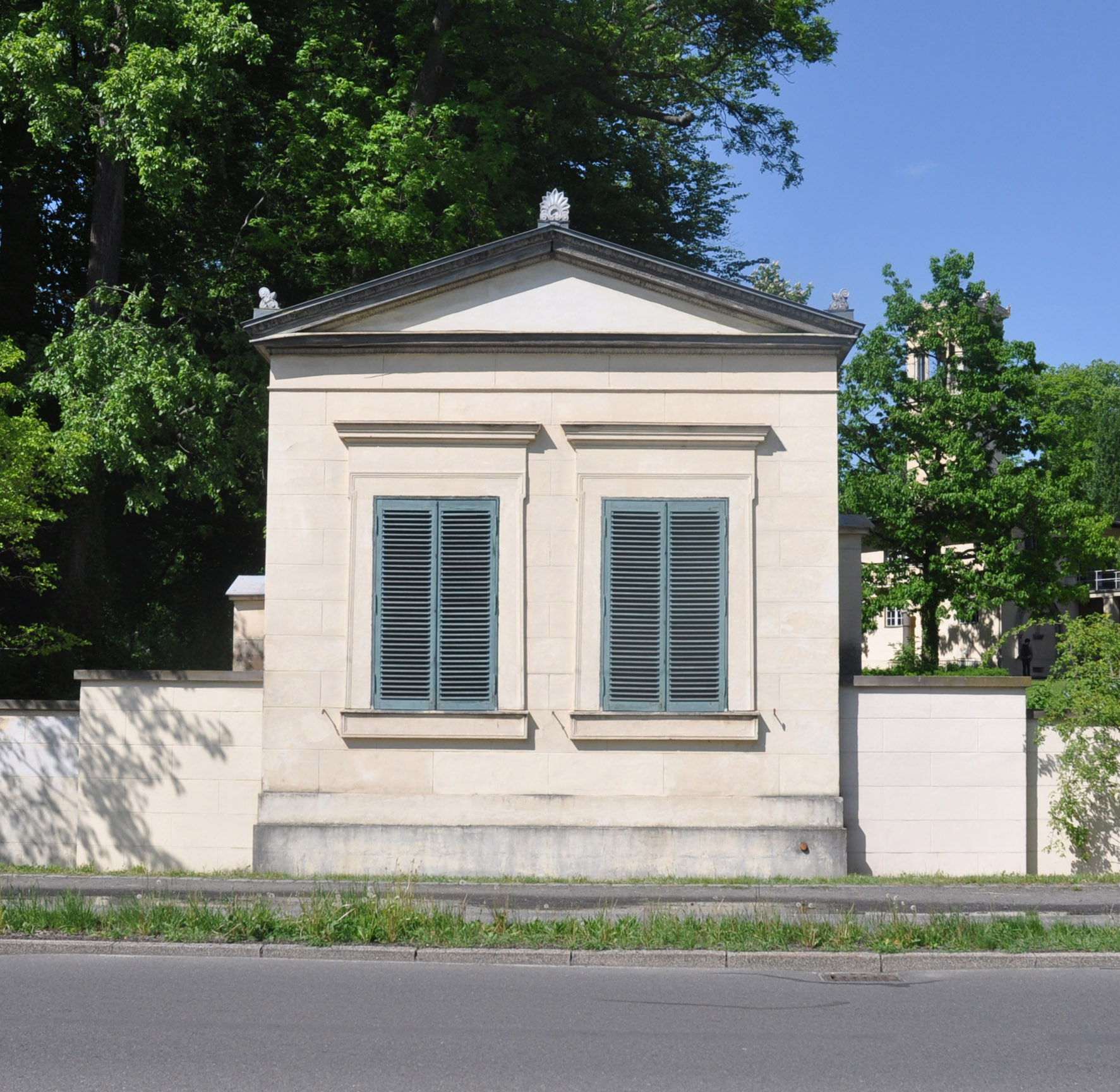 Südfassade der Neugierde an der Chaussee